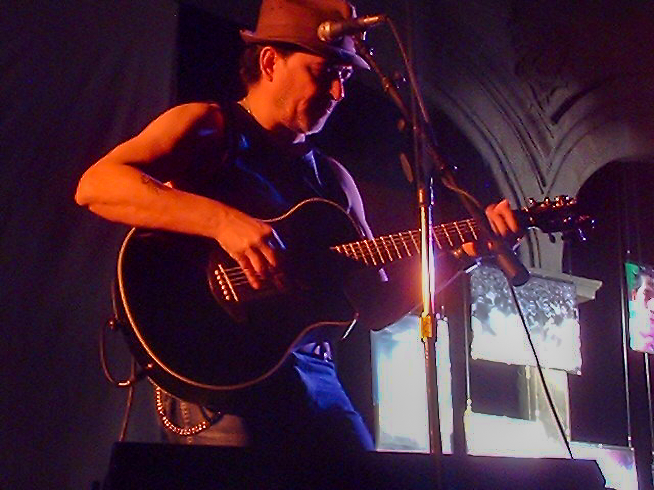 El compositor mexicano Jaime López